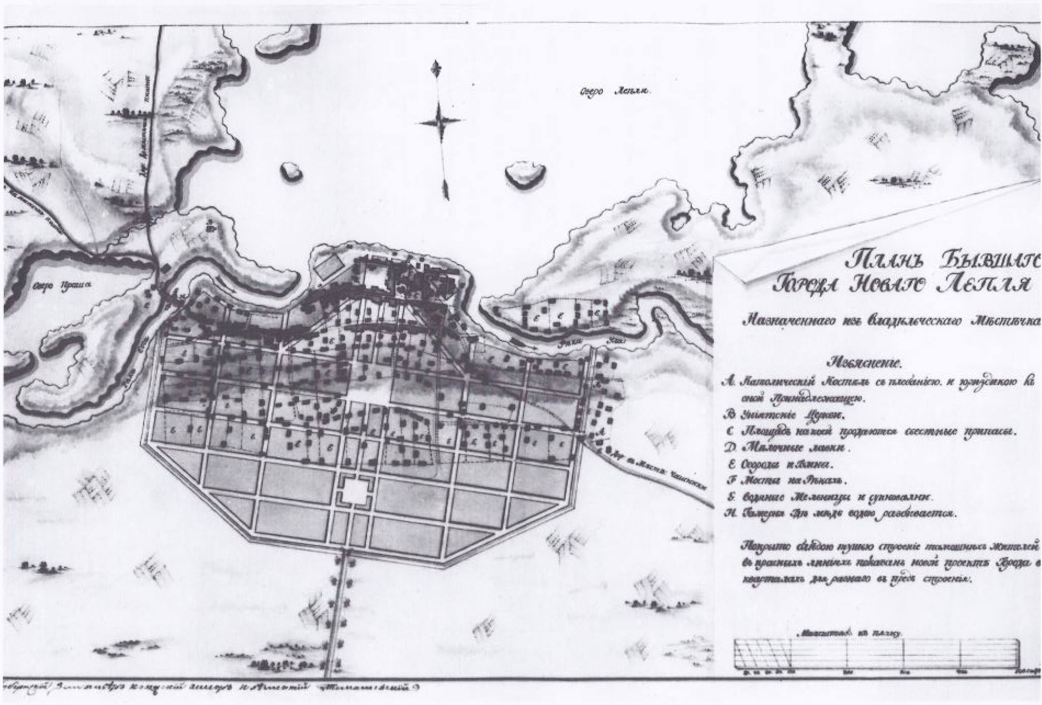 Беларуская (тарашкевіца): Лепель (Lepiel). Плян места, праект